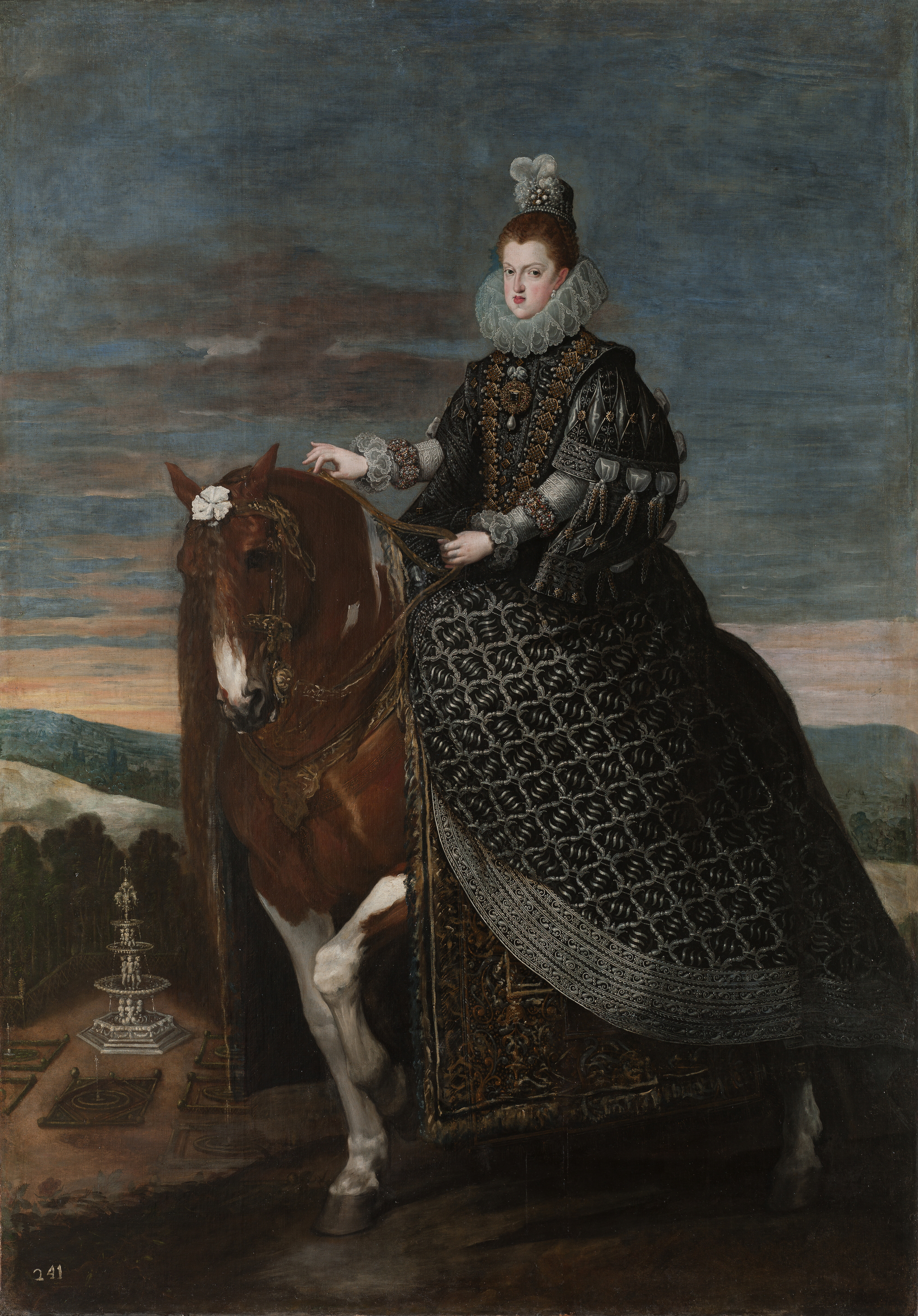 Retrato de la reina Margarita de Austria (1584-1611), que fue reina consorte de España por su matrimonio con el rey Felipe III de España y también la madre del rey Felipe IV.